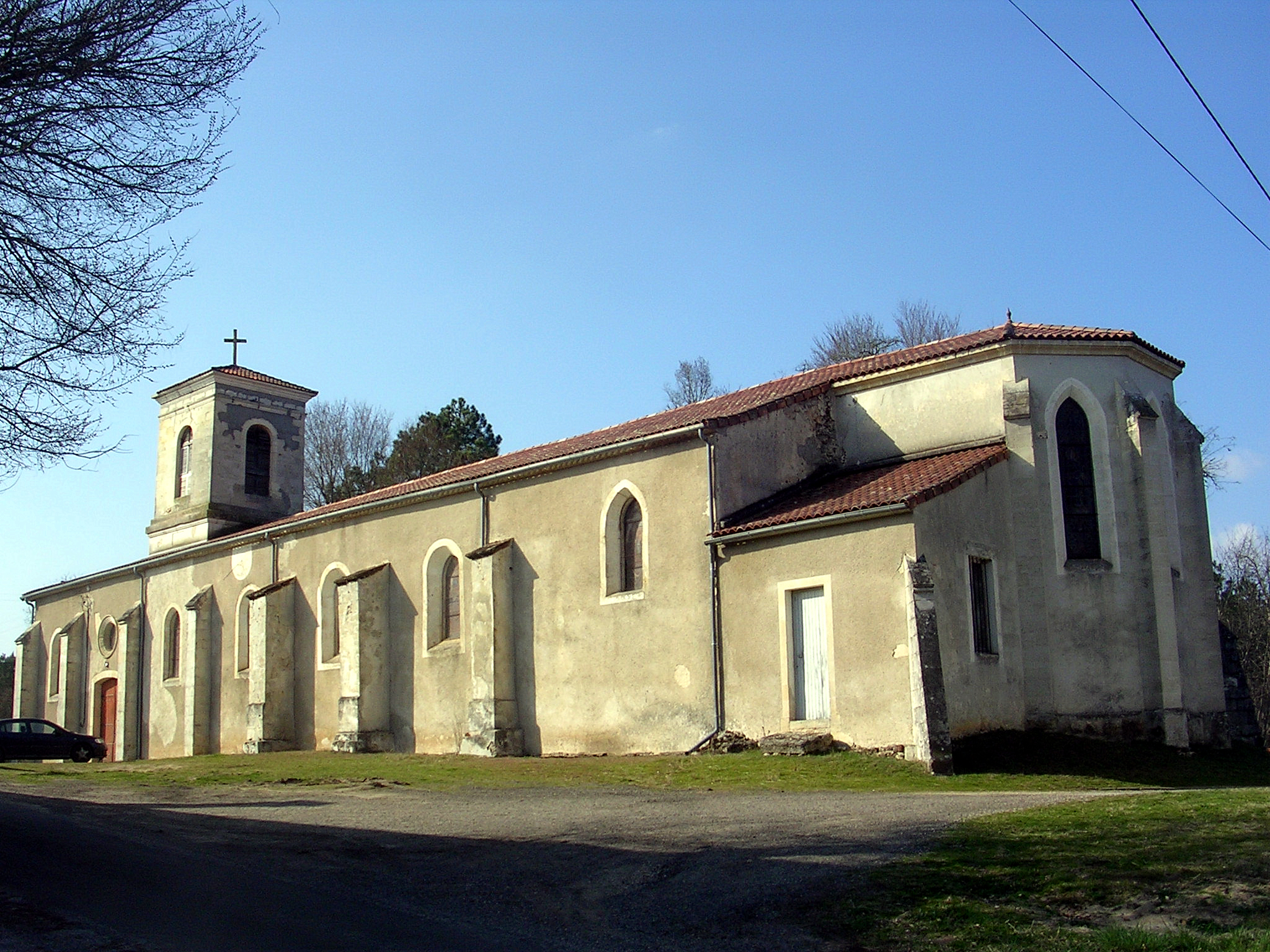 Eglise du bourg de Saugnacq-et-Muret, dans le département français des Landes